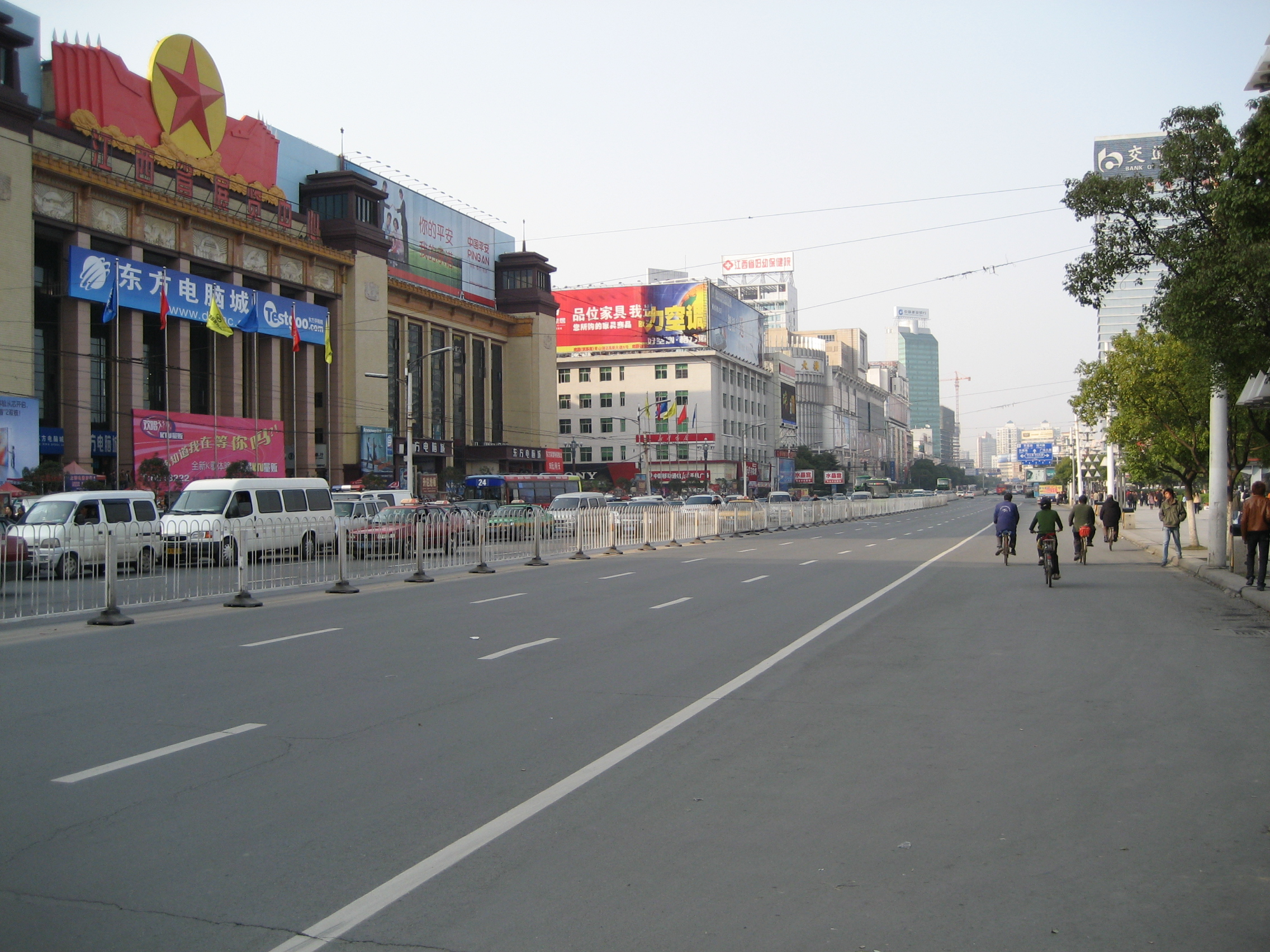 南昌八一大道